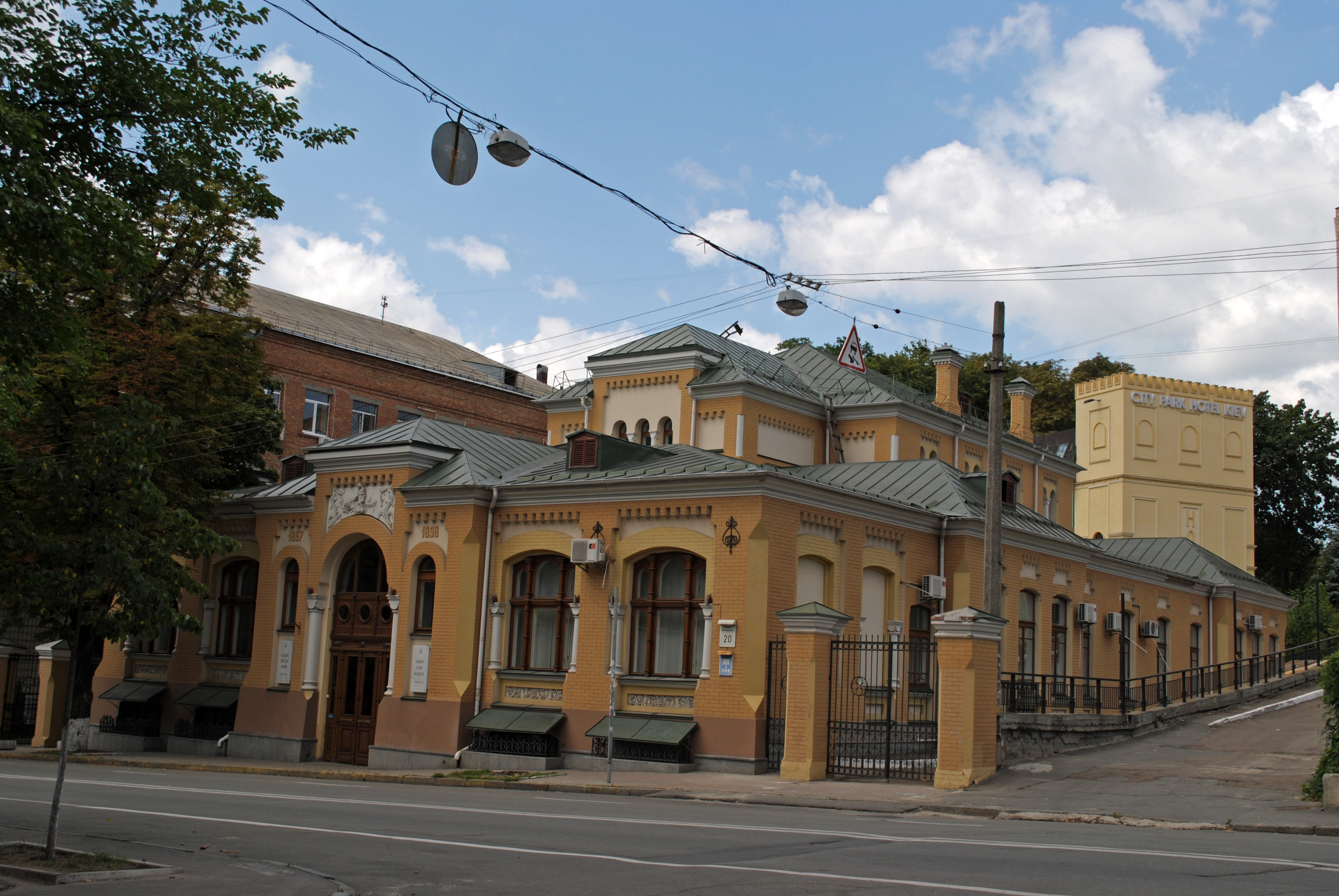 Будинок лікарні надання допомоги хворим дітям, Київ, Воровського вул., 20